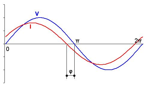 O gráfico mostra a onda de corrente adiantada em relação à onda de tensão - nesse caso o fator de potência é menor do que 1 e a carga possui componente capacitivo. Fonte (informar aqui, por favor)